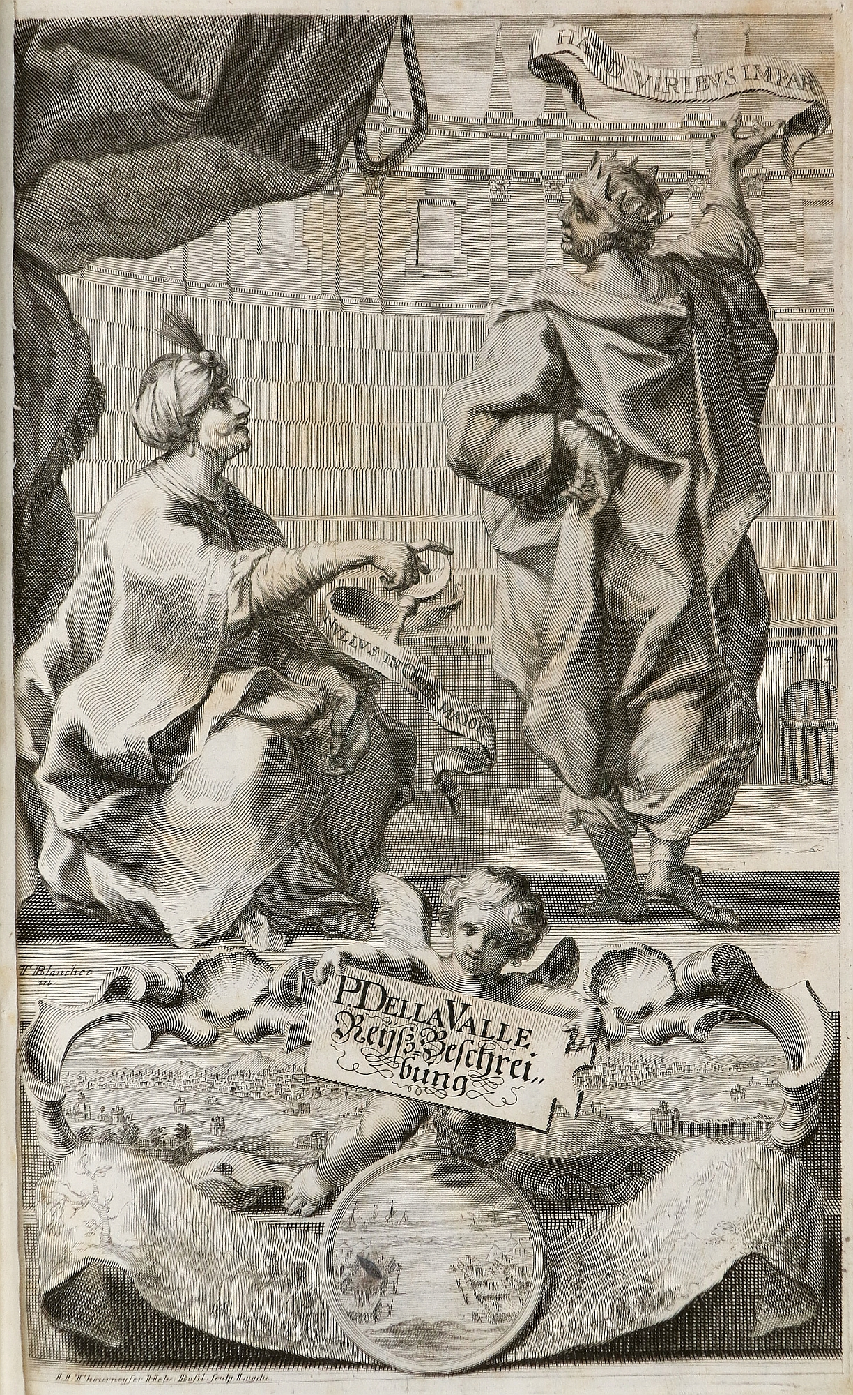 Titelkupfer. Pietro della Valle zugenandt der Pilgram / Reiß-Beschreibung in die Orientalische Länder ... / Genf: Widerhold, 1674. Wissenschaftliche Stadtbibliothek Mainz. Signatur: IV m:2°/317